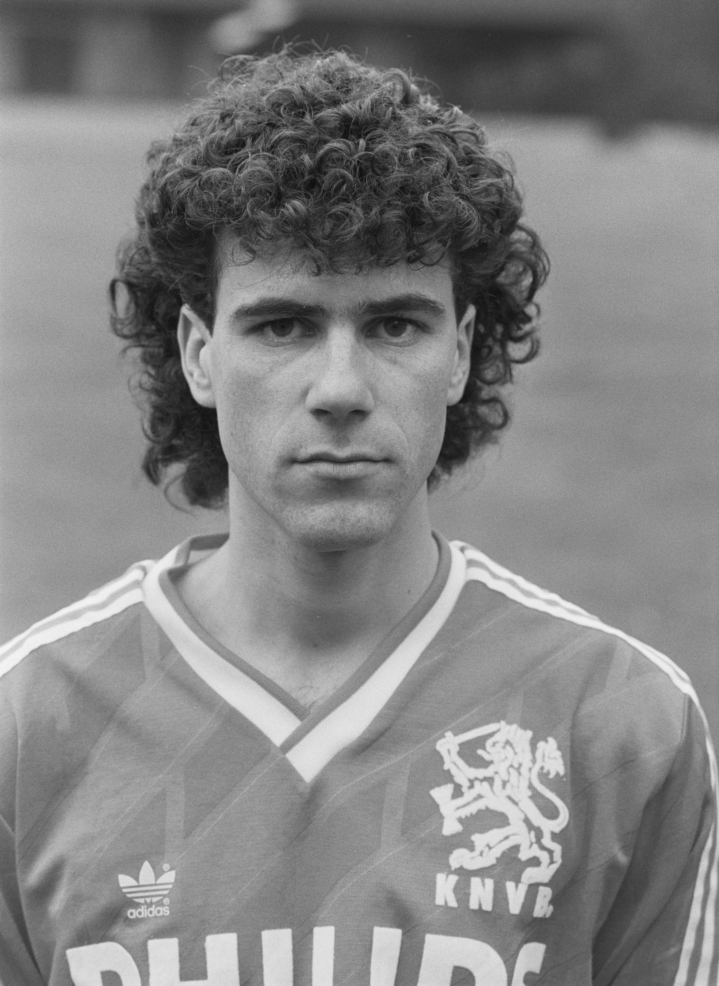 Collectie / Archief : Fotocollectie Anefo Reportage / Serie : [ onbekend ] Beschrijving : Selectie Nederlands elftal in Zeist; 16a, 17a Peter Bosz Datum : 21 maart 1988 Locatie : Utrecht, Zeist Trefwoorden : sport, voetbal Persoonsnaam : Peter Bosz Fotograaf : Croes, Rob C. / Anefo Auteursrechthebbende : Nationaal Archief Materiaalsoort : Negatief (zwart/wit) Nummer archiefinventaris : bekijk toegang 2.24.01.05 Bestanddeelnummer : 934-2144